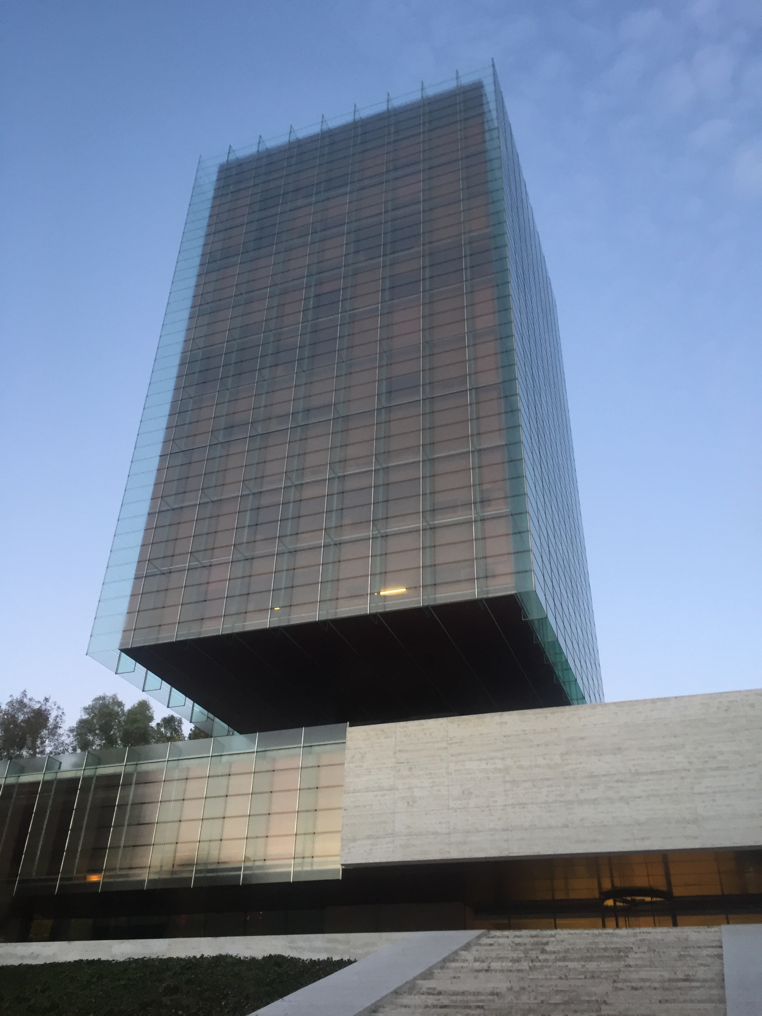 Edificio Castelar, Madrid